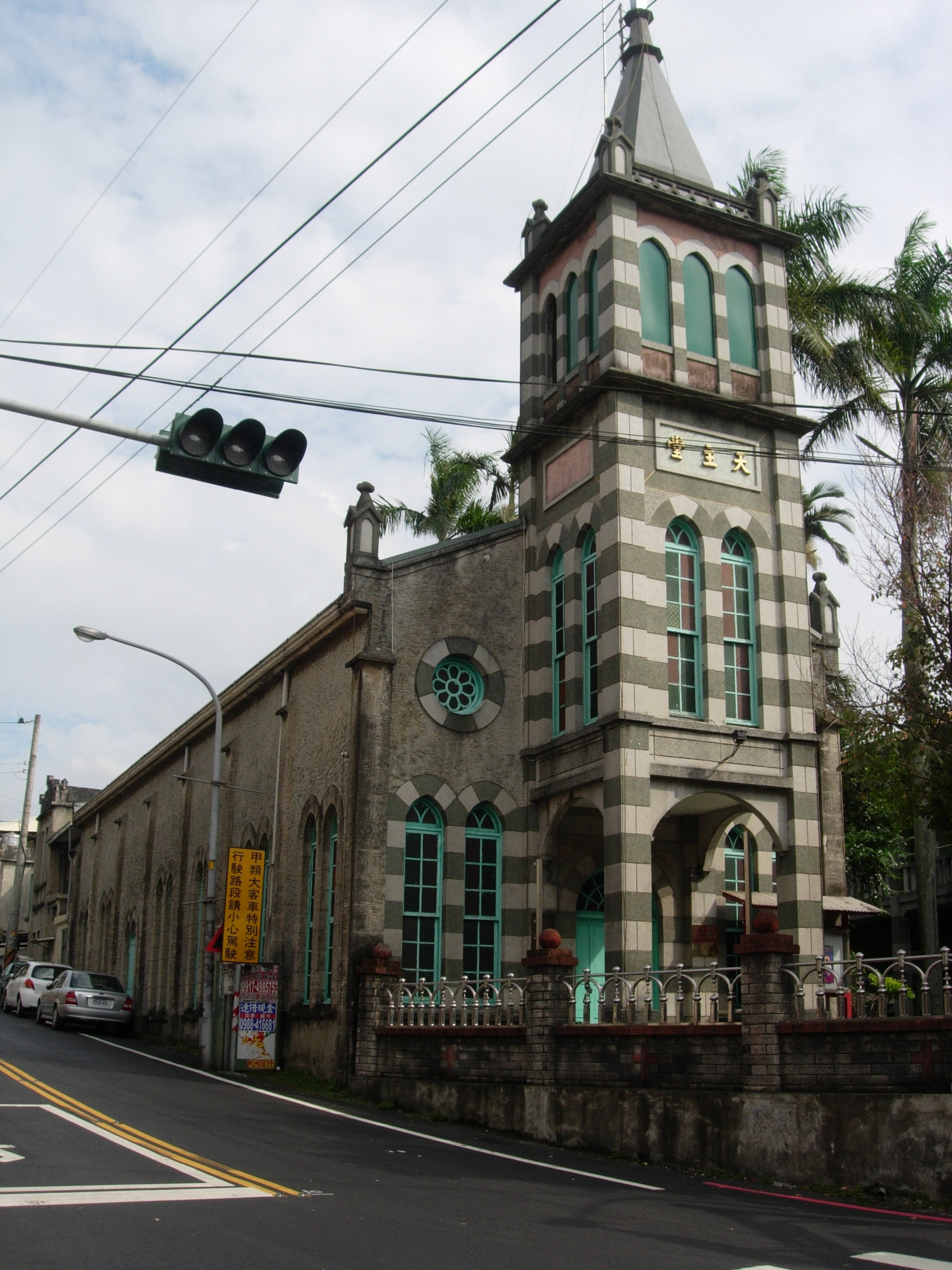 中文（台灣）: 關西天主堂。